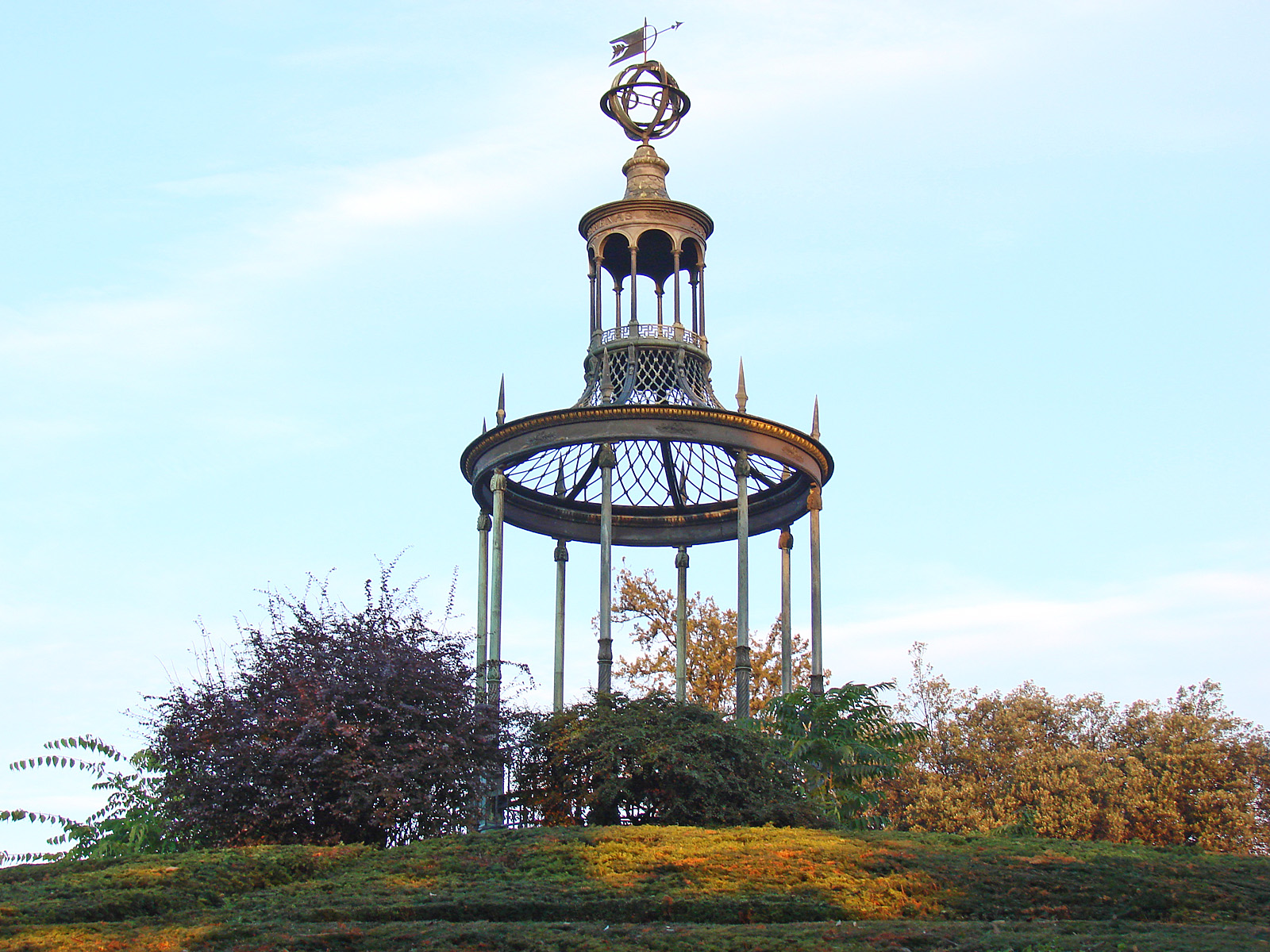 Le kiosque édifié en 1786 selon les plans de Verniquet et qui constitue le plus ancien édifice métallique de Paris. Sa très belle structure provient des forges que Buffon possédaient à Montbard (Côte-d’Or). L’édifice associait au départ le fer, le cuivre, l’or, le bronze et le plomb. Héritier du Jardin royal des plantes médicinales dont la création fut décidée en 1626, sous Louis XIII, l'actuel Jardin des Plantes s'ouvre au public en 1640. À la fois établissement scientifique et service public, tourné vers la recherche et la diffusion des connaissances, le Muséum assume de grandes missions fondatrices qui régissent et nourrissent l'ensemble de ses activités.